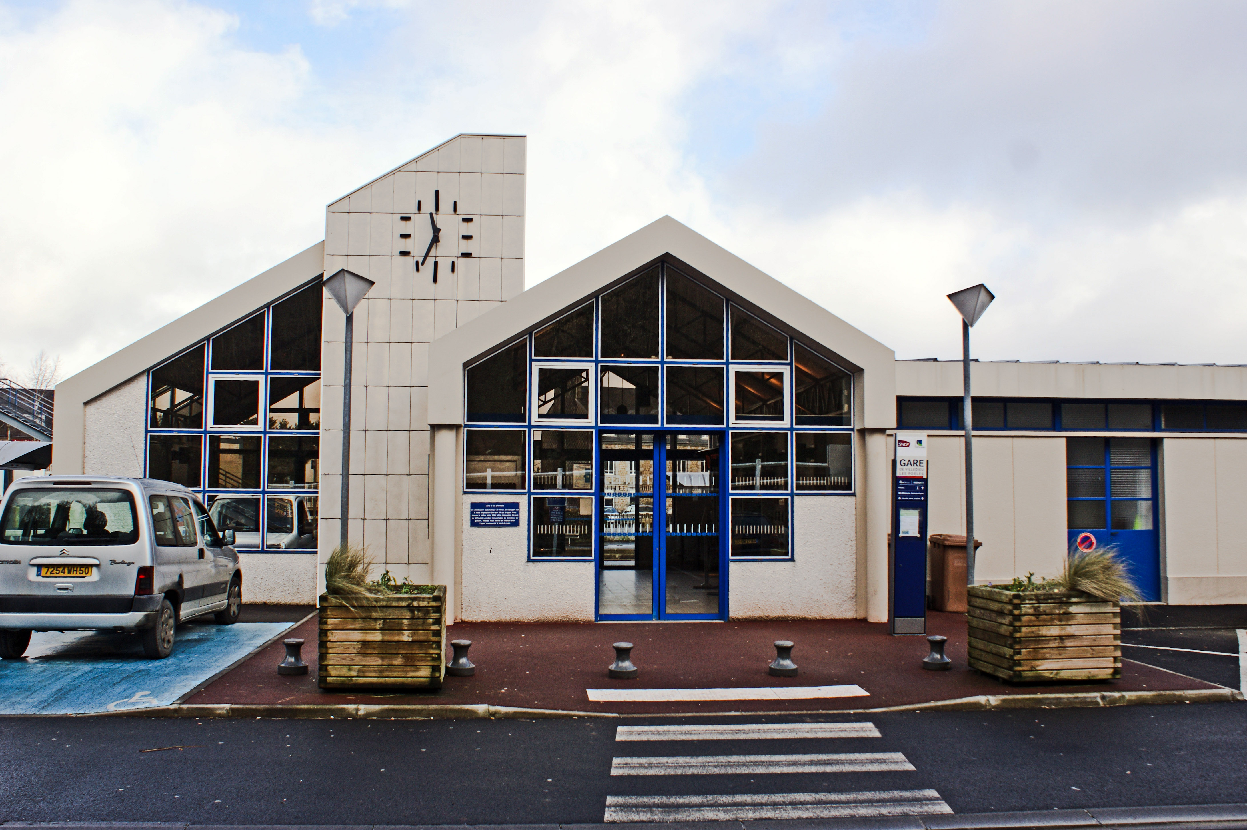 Le bâtiment voyageurs et l'entrée de la gare de Villedieu-les-Poêles.